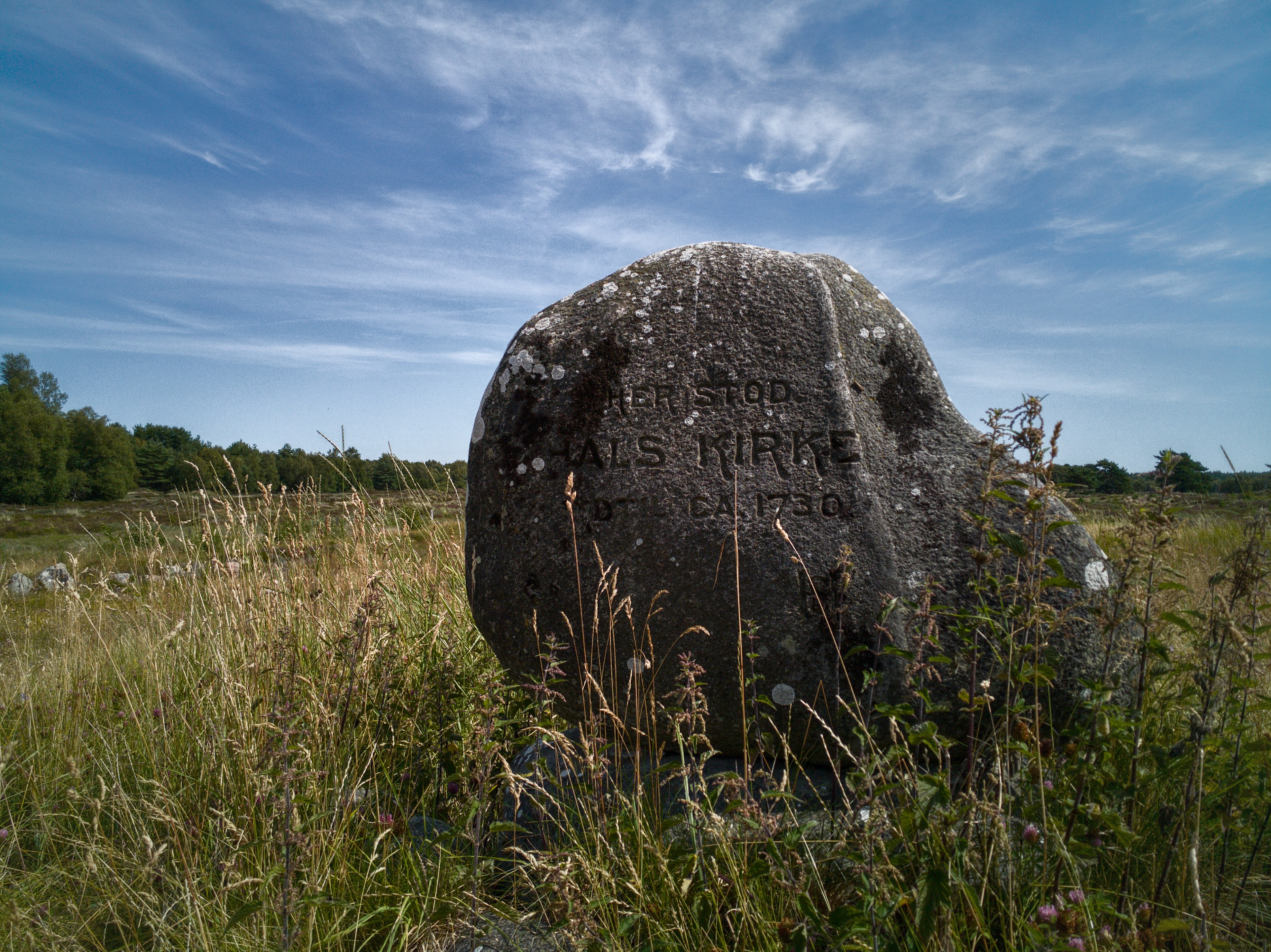 Denkmal auf Læsø (dänische Insel) für das von einer Wanderdüne verschüttete Dorf Hals. Der Gedenkstein markiert in etwa den Standort des Altars der Kirche, von der nur noch Reste des Fundaments zu erahnen sind. Grund für die Verschüttung war die Abholzung der Wälder, deren Holz für die Salzsiedereien gebraucht wurde.